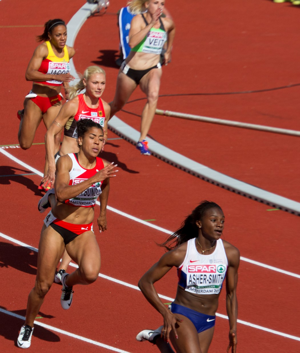 0170 kampbundji asher smith 200m reeksen